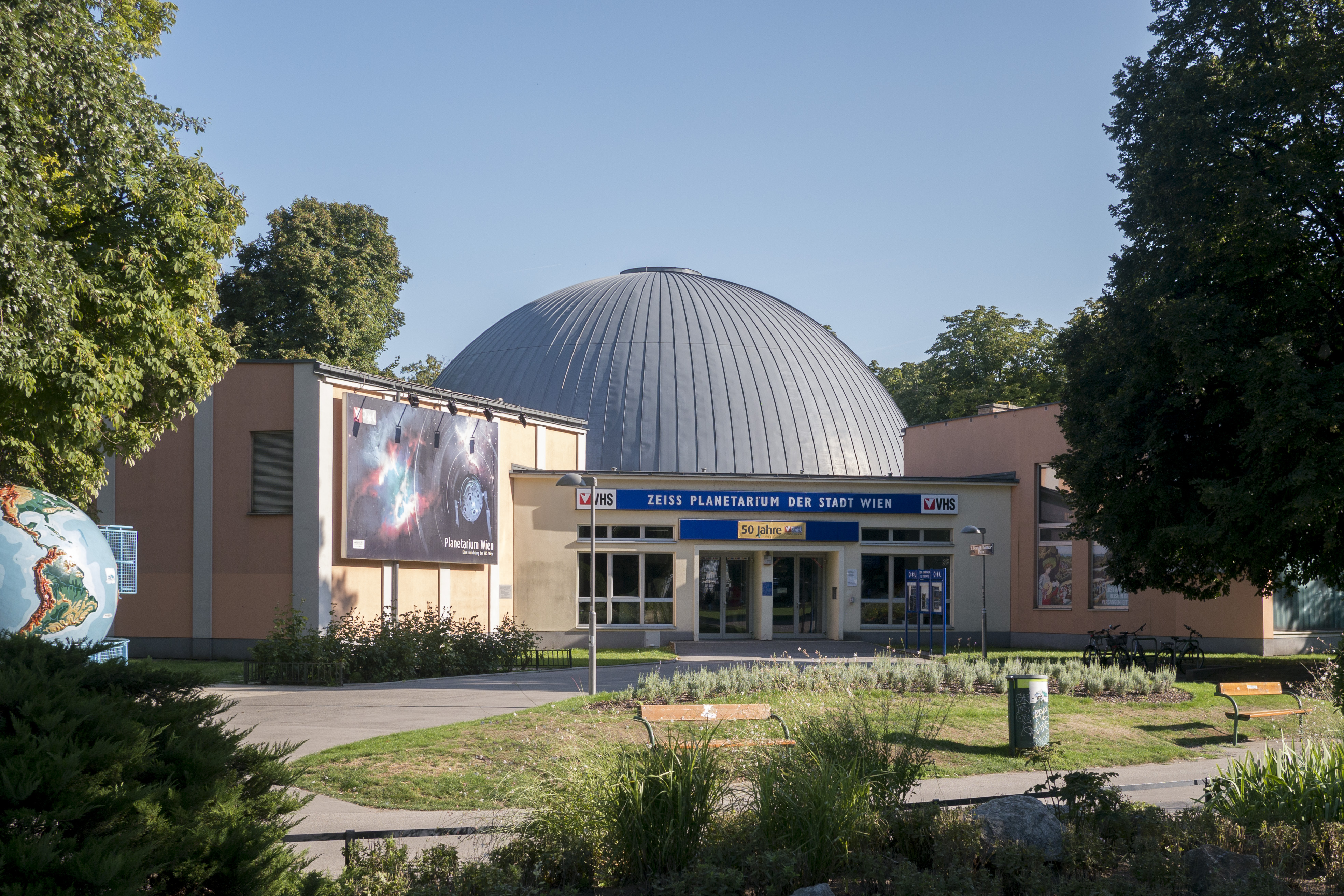 Zeiss Planetarium der Stadt Wien